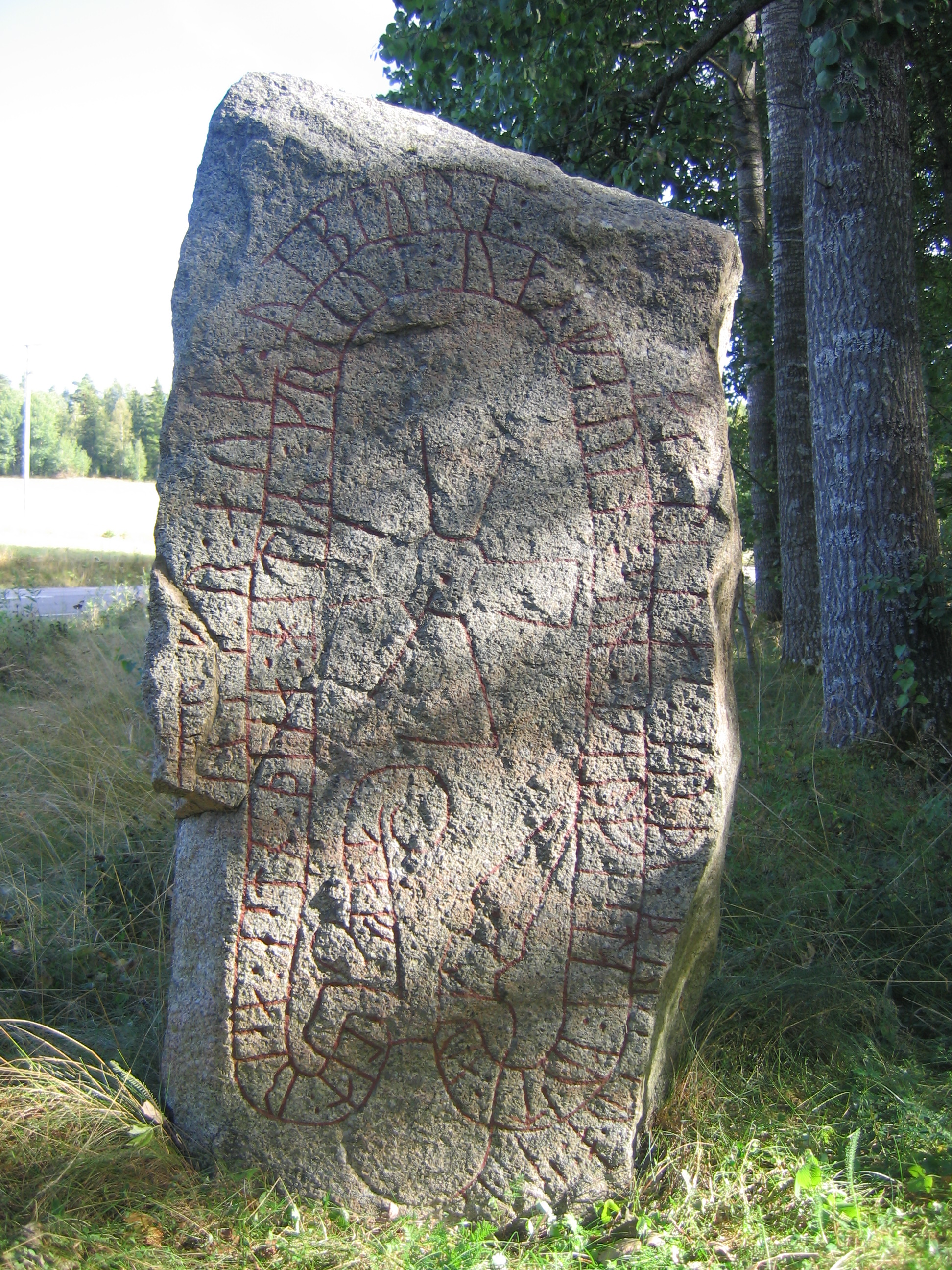 runestone Vs Fv1988;36 at Jädra, Västerås.